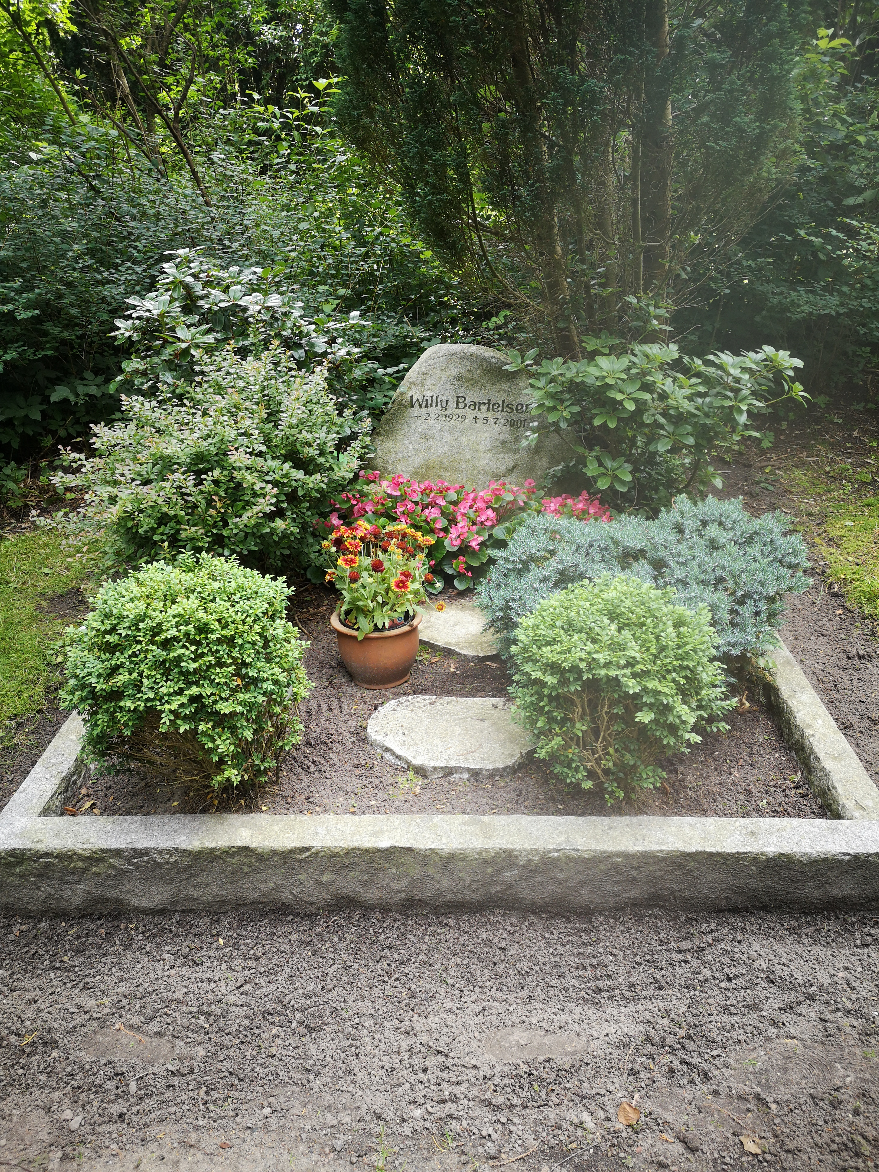 Grab von Schauspieler Willi Bartelsen auf dem Mühlenfriedhof Flensburg, 2020